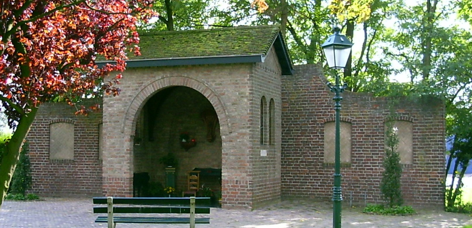 Maria Kapel te Elshout, gelegen aan de Kapelstraat.